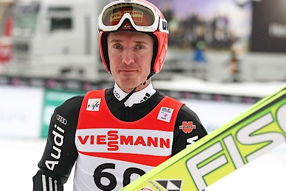 Michael Uhrmann podczas serii treningowej przed konkursem indywidualnym mężczyzn na Mistrzostwach Świata w Narciarstwie Klasycznym 2011 w Oslo.